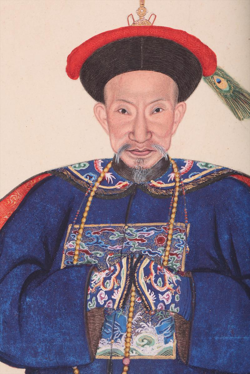 《御筆平定臺灣二十功臣像贊》中的孫士毅畫像，2014年由紐約iGavel拍賣行拍賣。